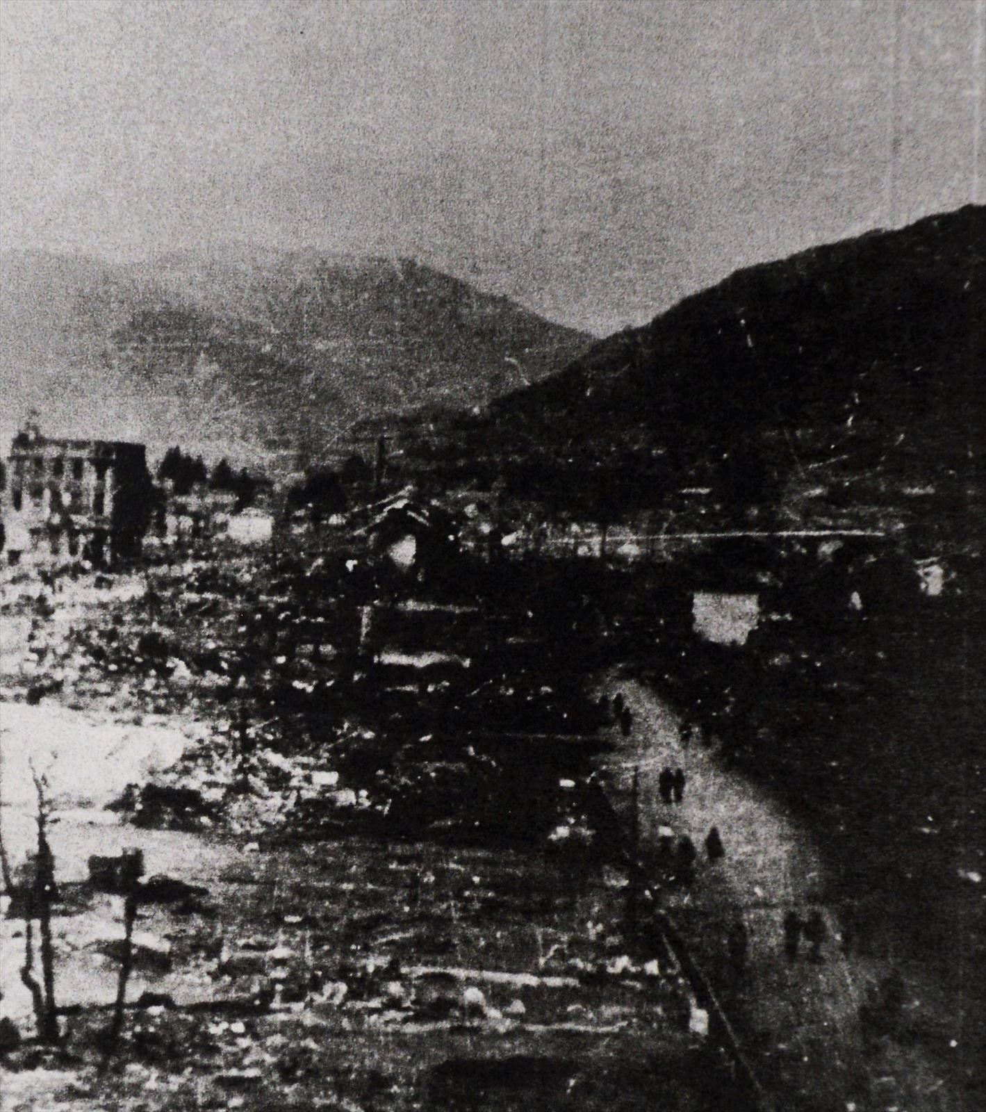 1947年の飯田大火。